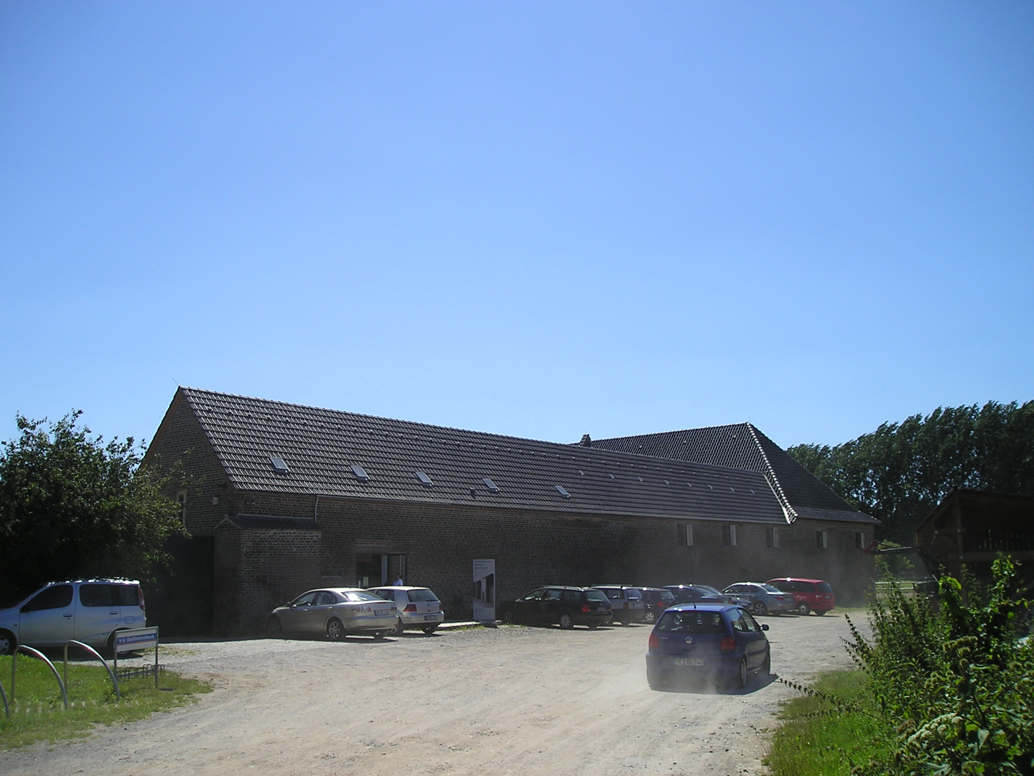 Haus Bürgel, Archäologisches Museum